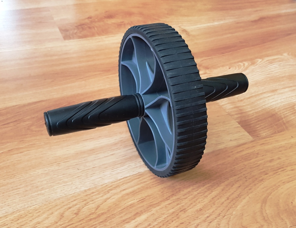 Kółko do ćwiczeń rolka wałek mięśnie brzucha AB wheel ab roller Bauchroller Bauchmuskeltrainer